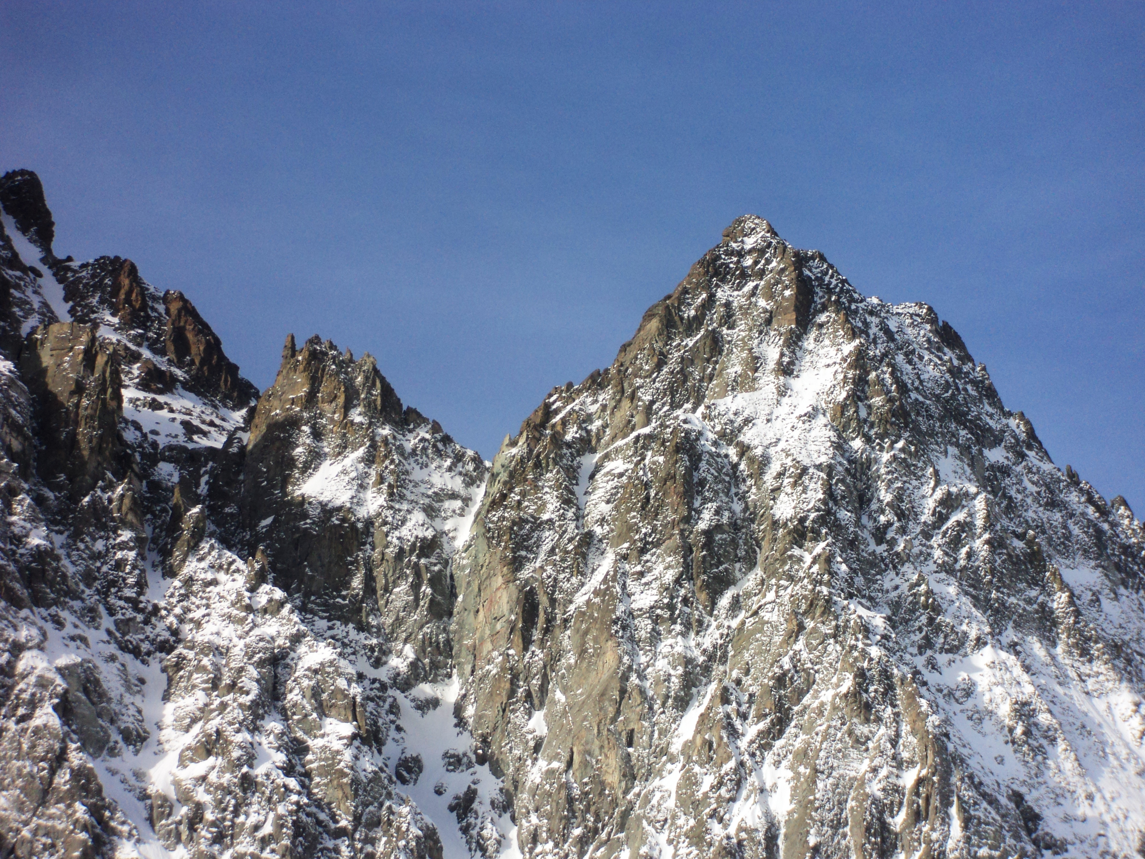 Le Cadreghe di Viso ed il Visolotto. A sinistra i contrafforti del Monviso.